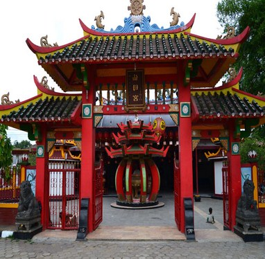 Bihara